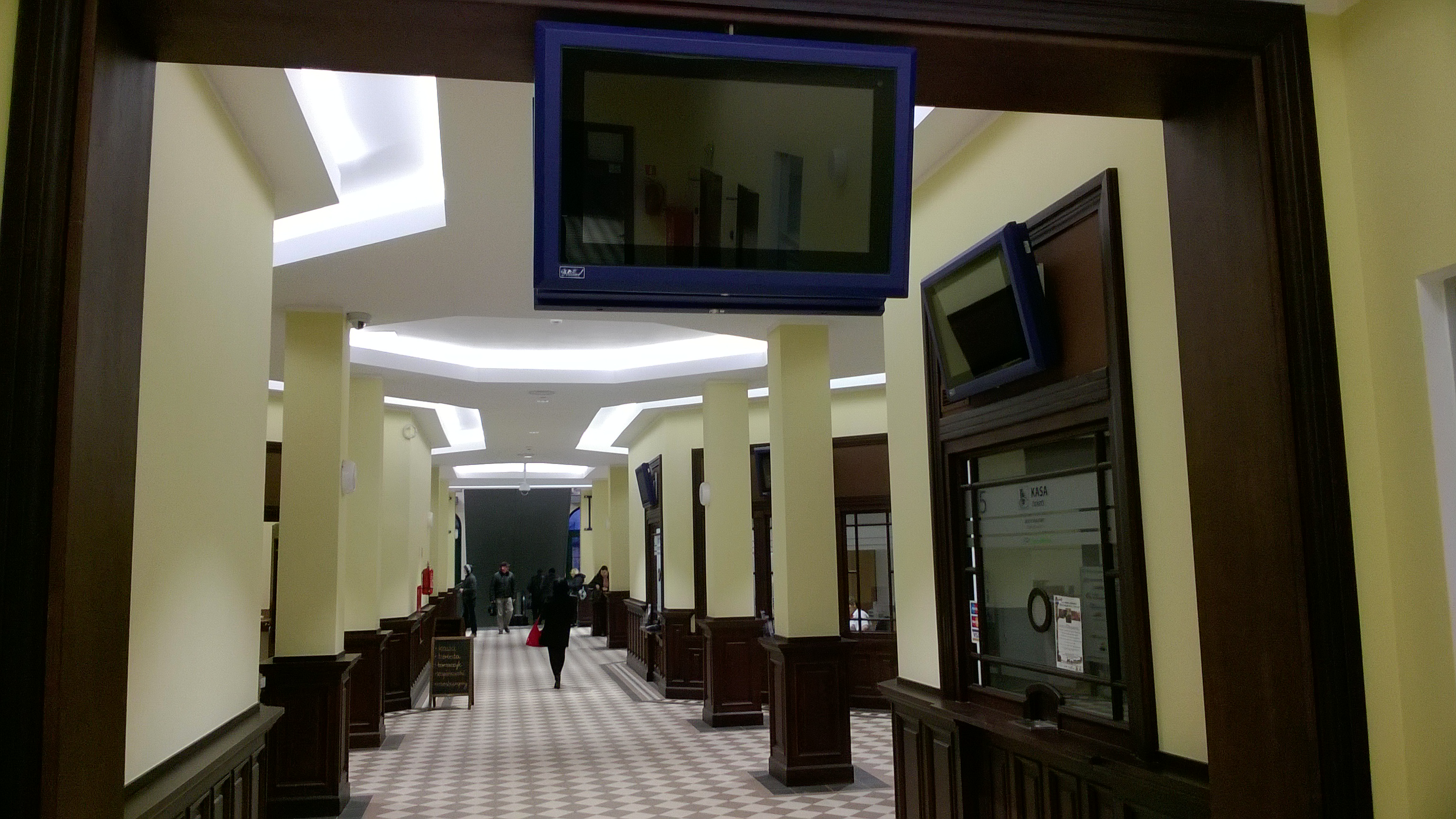 Fragment wnętrze dworca Toruń Główny